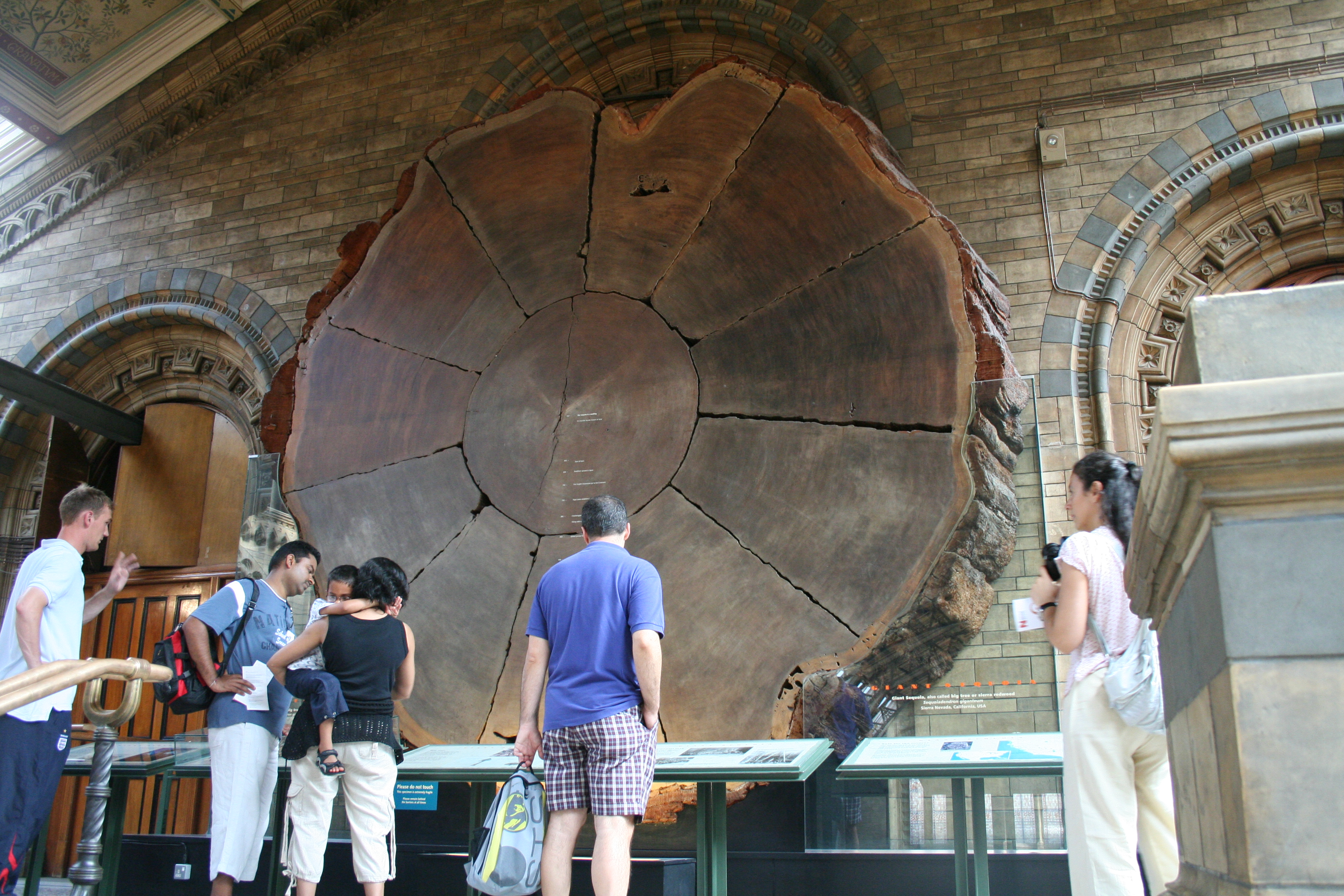 1300 Jahre alter Riesenmammutbaum (Sequoiadendron giganteum), gefällt im Jahre 1892. Standort: Natural History Museum - London